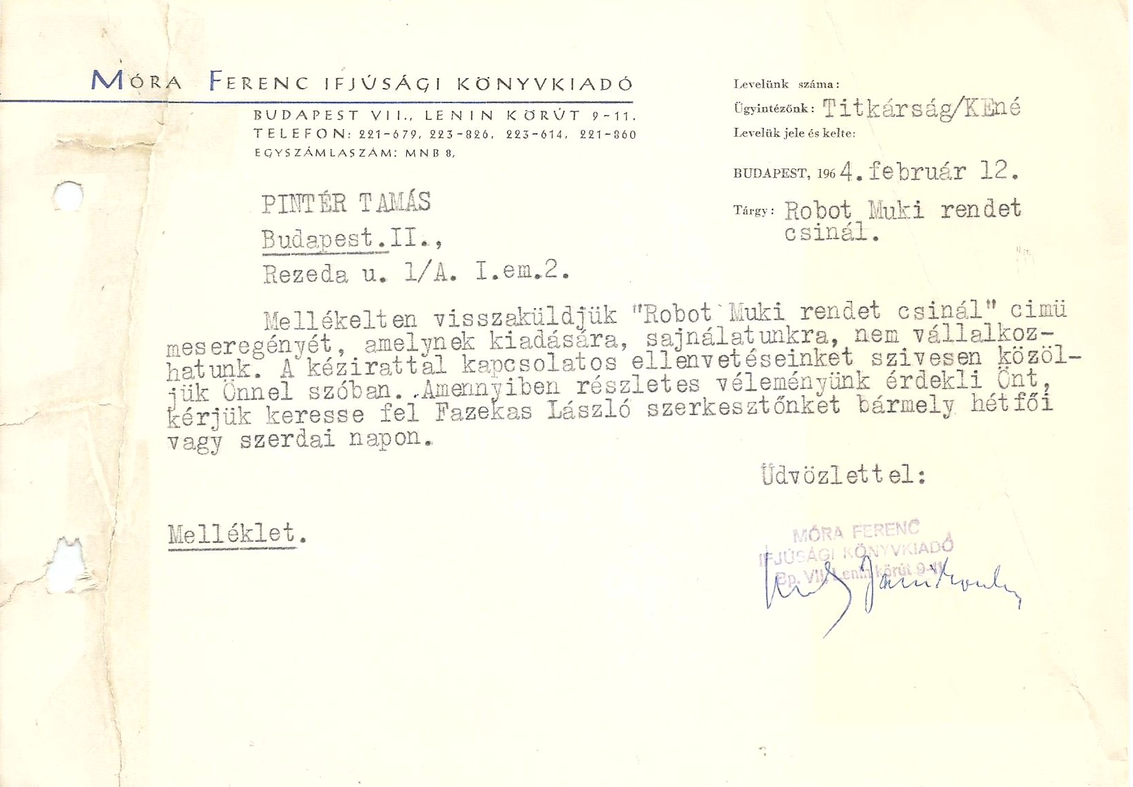 Pintér Tamás Robot Muki című meseregényének kiadói visszautasítása, 1964